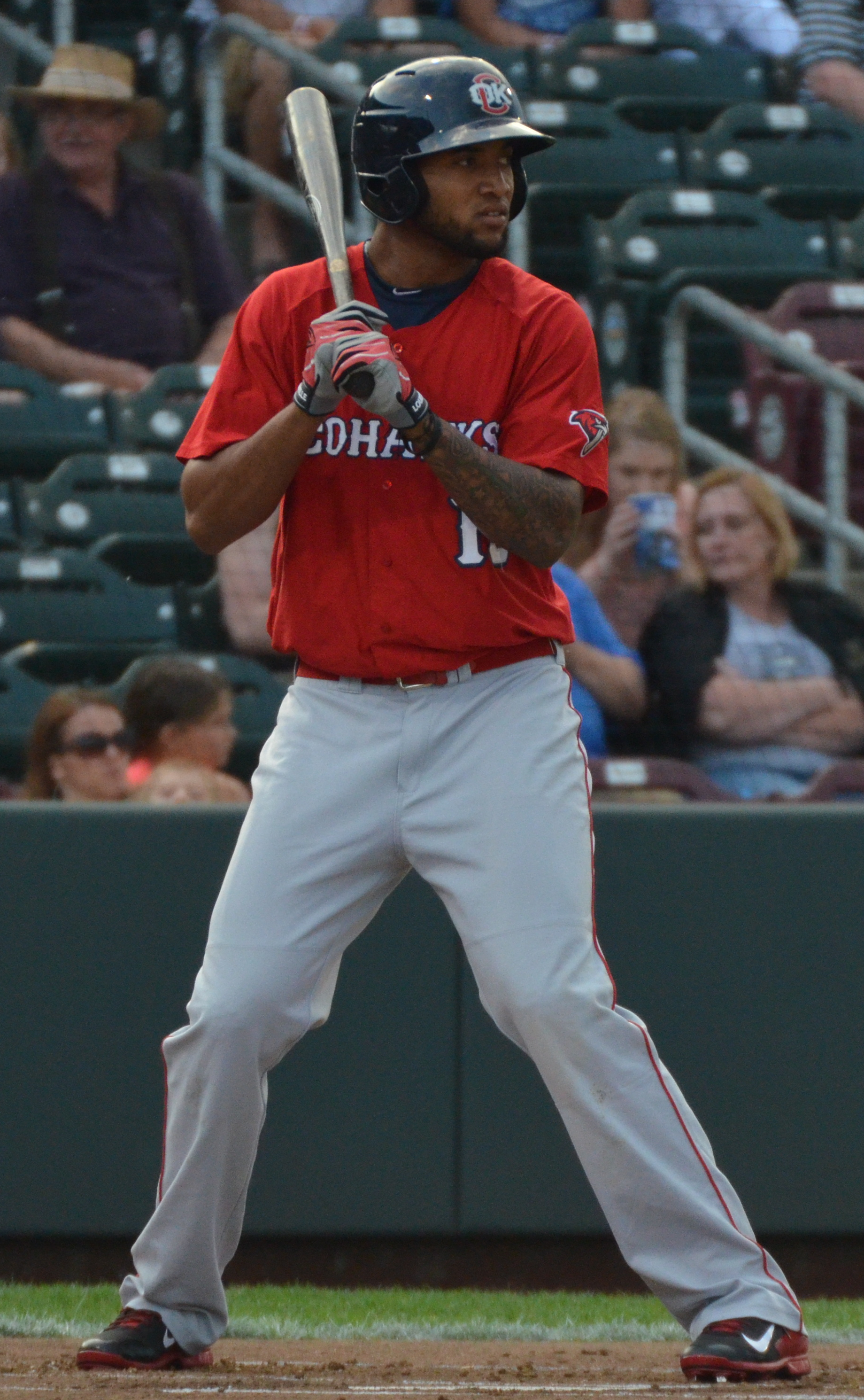 Domingo Santana